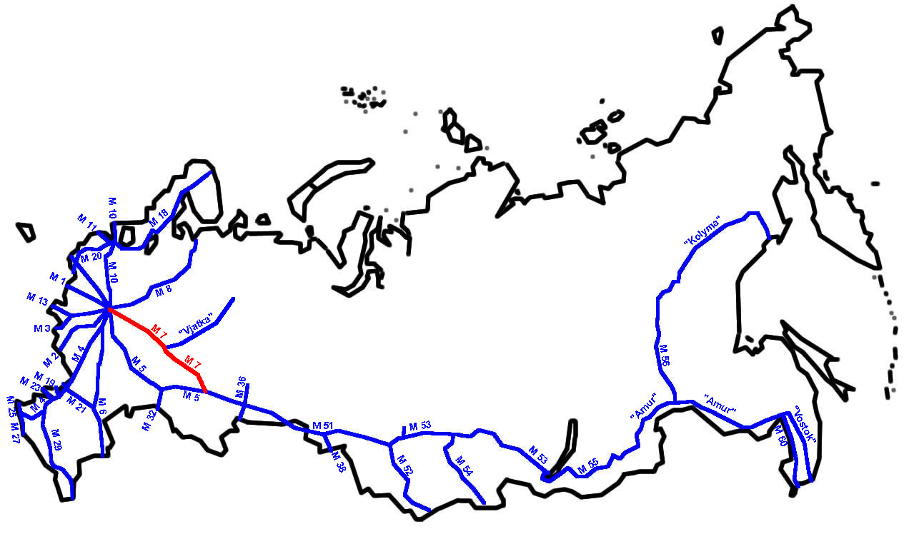 M7 im russischen Fernstraßennetz